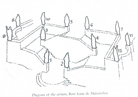 diagrama de atrio - ubicación y enumeracion 12 apostoles